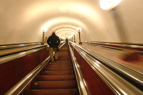 Merto Station RUSTAVELI in Tbilisi, Georgia